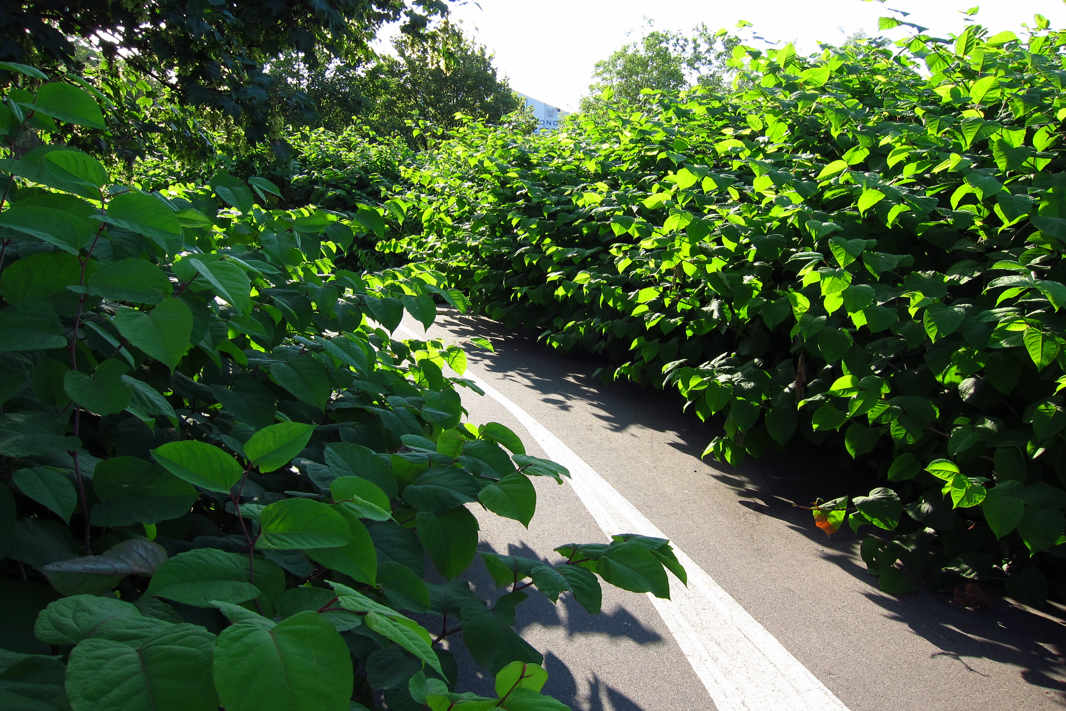 Chilly-Mazarin (Essonne, Île-de-France, France) : Piste cyclable bordée de Fallopia japonica.